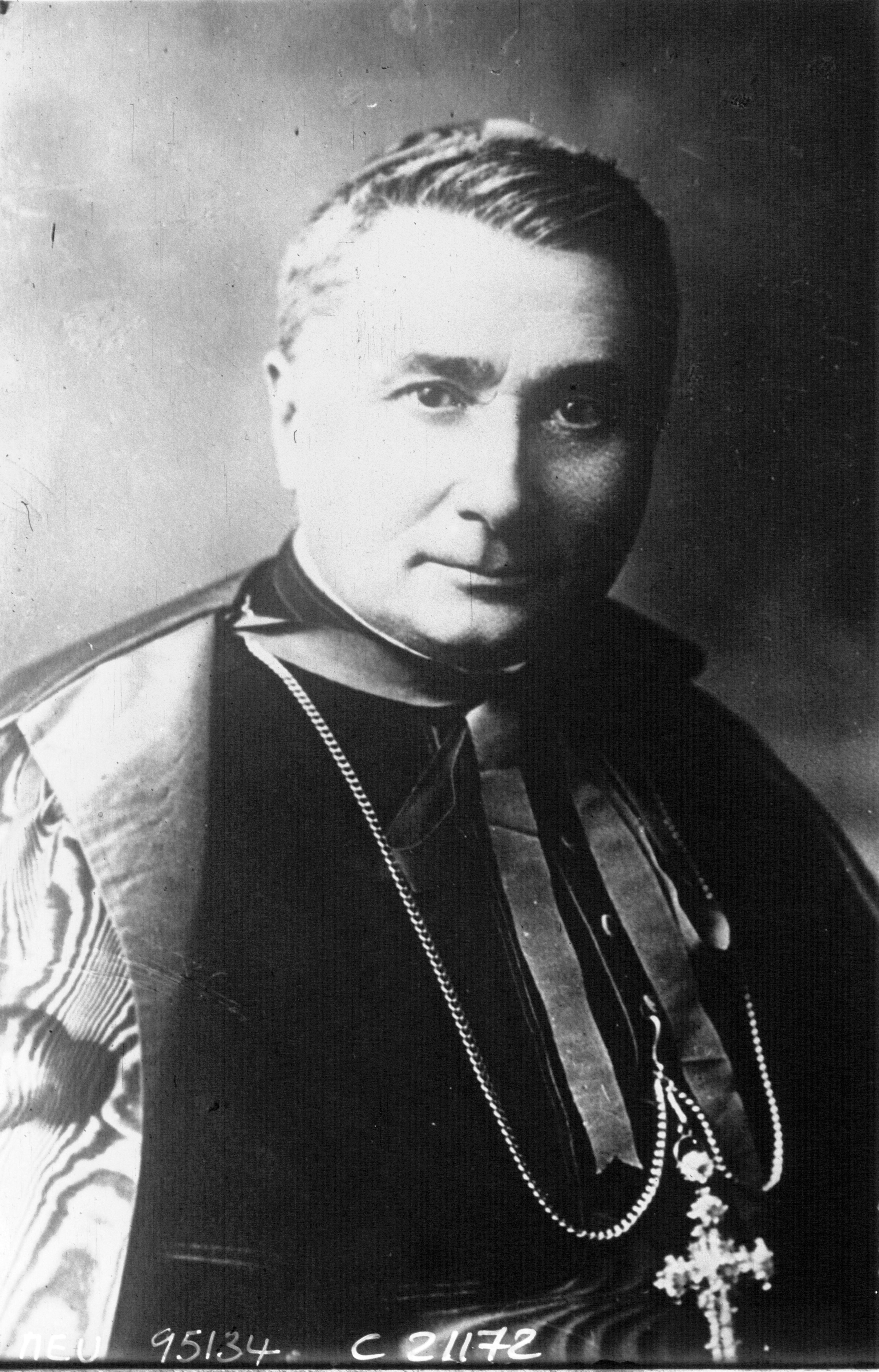 Cardinal Bisleti (photographie de presse)